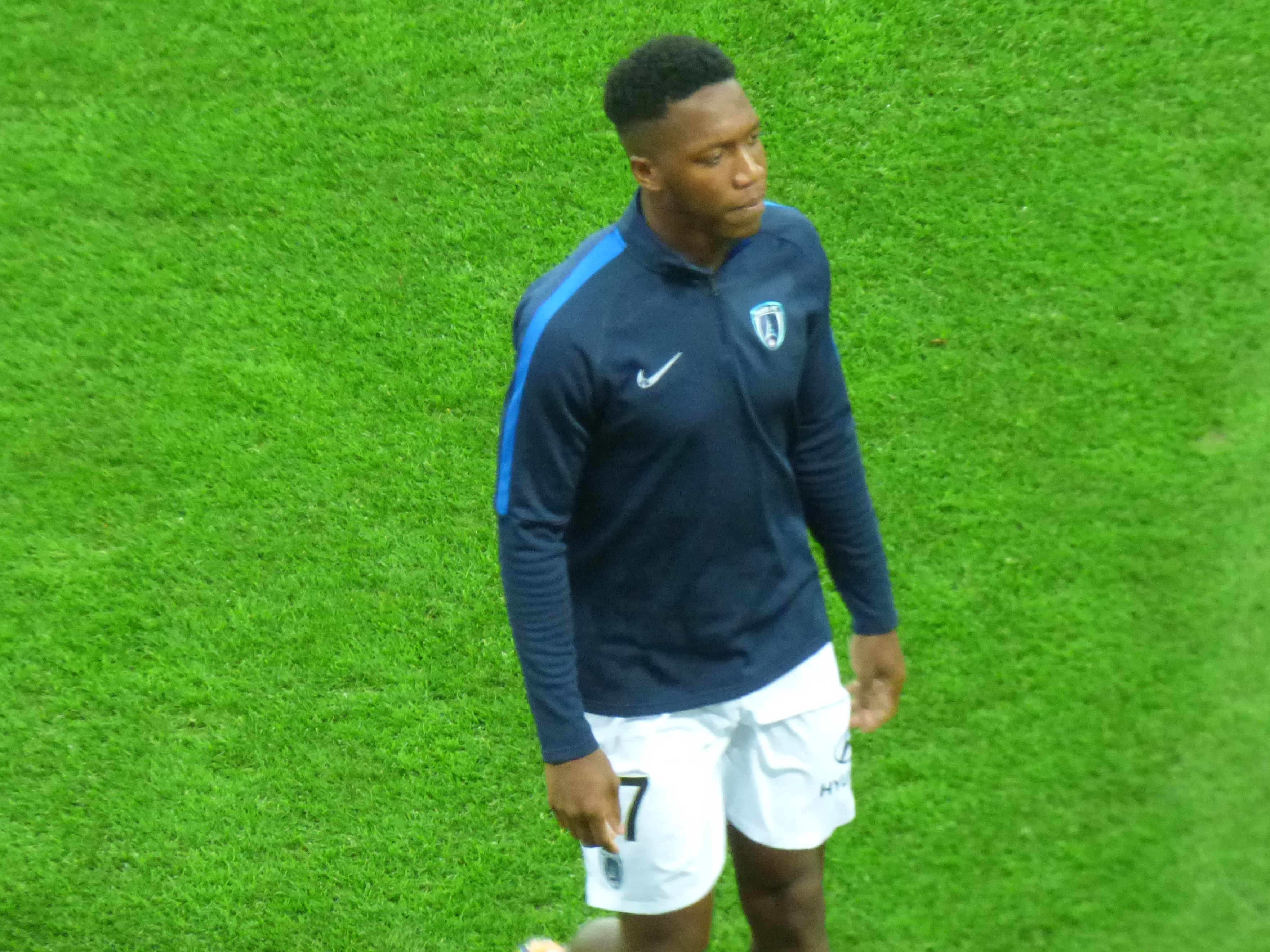 Samuel Yohou avant le match Lens / Paris, comptant pour la neuvième journée du championnat de France de football de Ligue 2, le 28 septembre 2018.